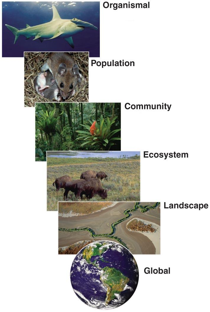 ekosistem